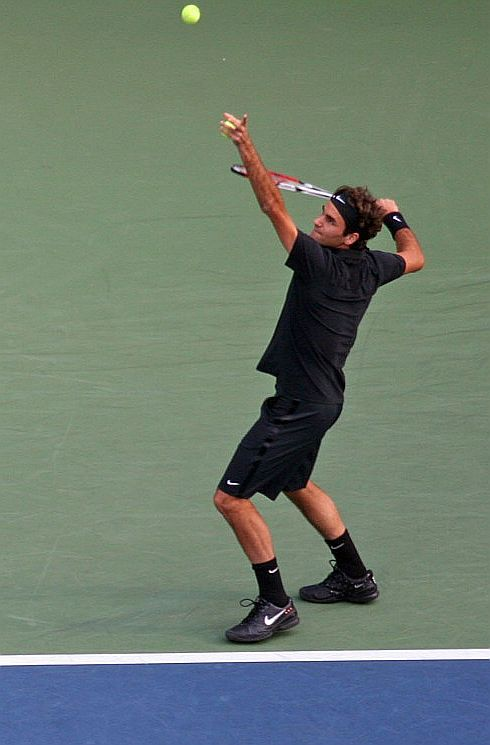 Federer a 2007-es US Openen